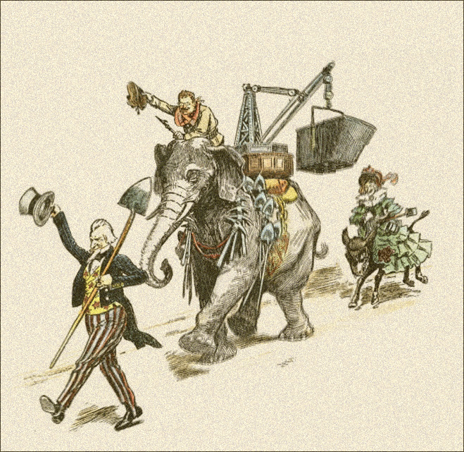 Political Caricature: On To Panama!